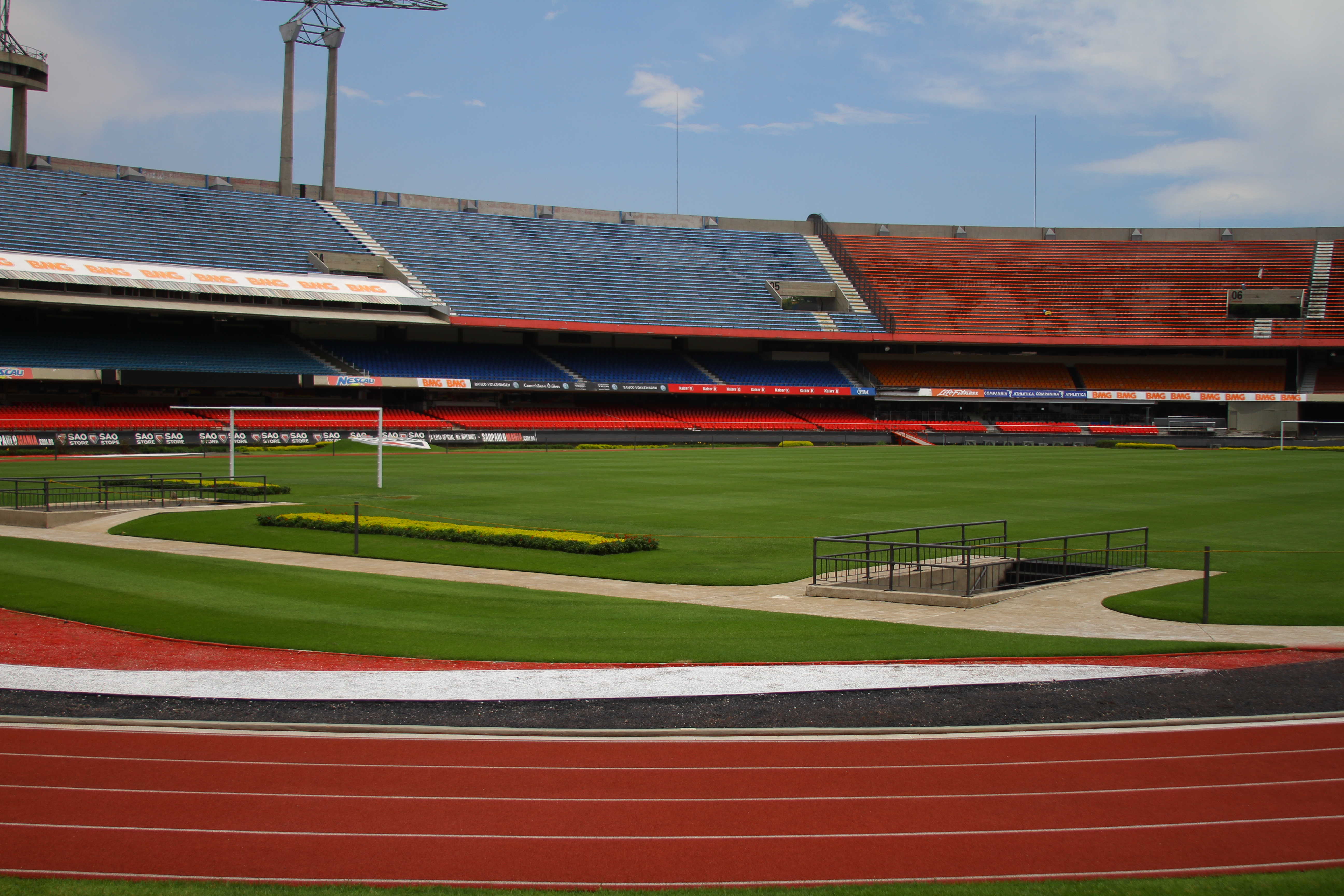 Estádio Cícero Pompeu de Toledo